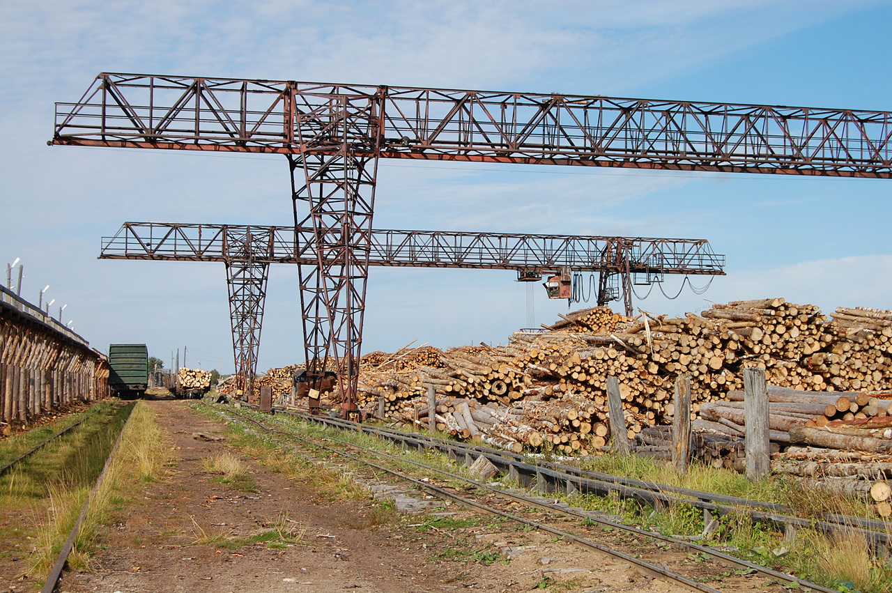 Нижний склад, Удимская УЖД